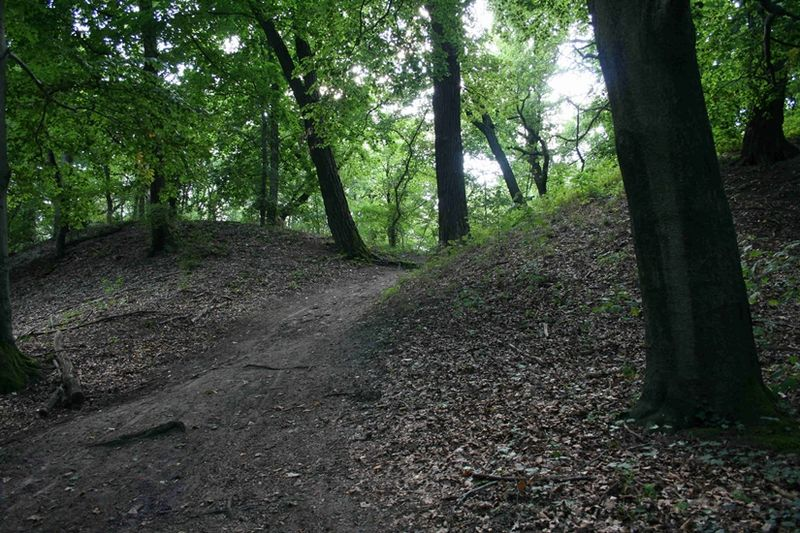 Walltor